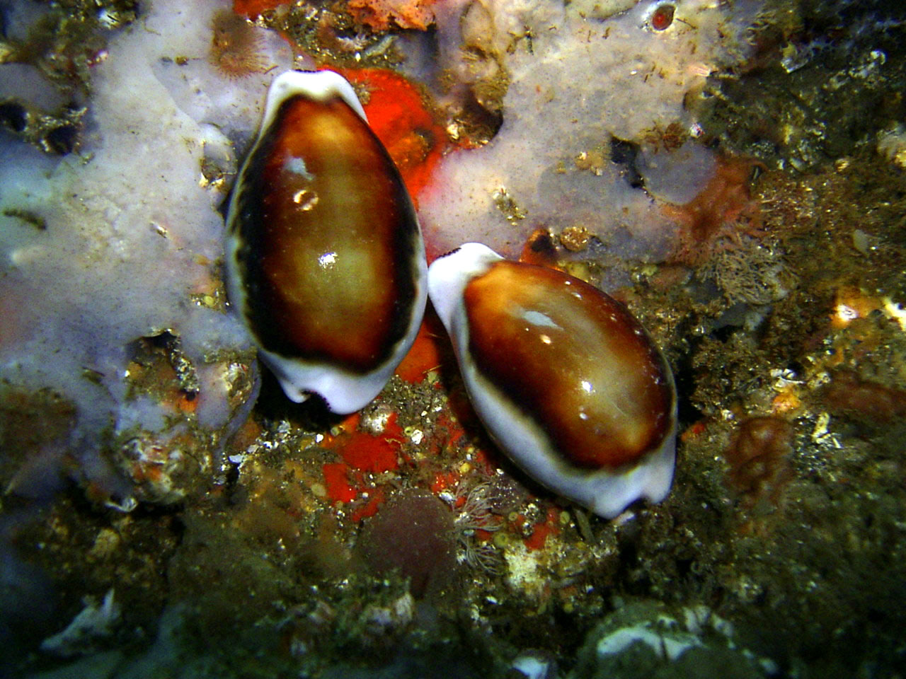 Cypraea spadicea